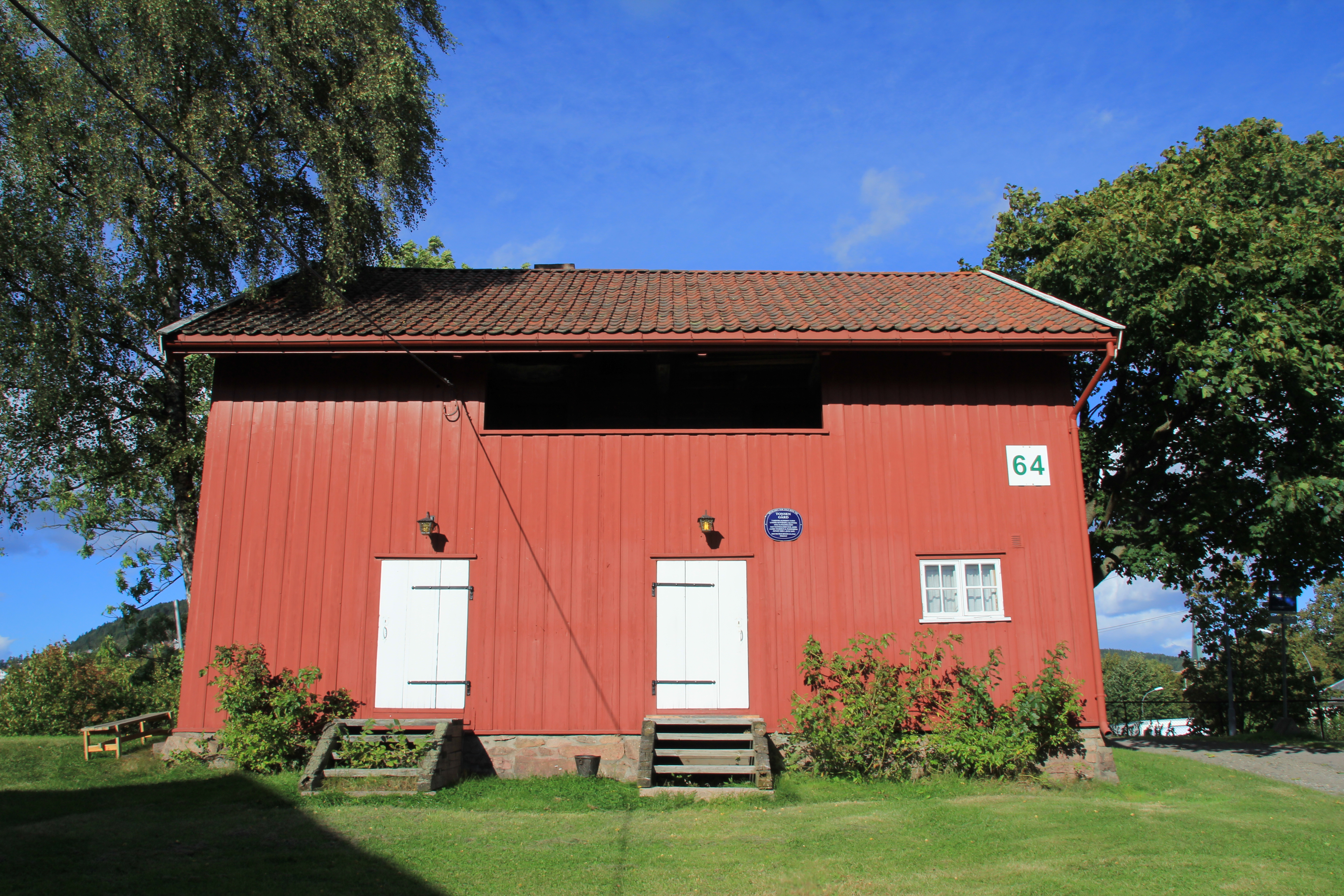 Tonsen Gård ligger i Bydel Bjerke i Oslo kommune. Bygning oppført omkring 1760. Fredet.